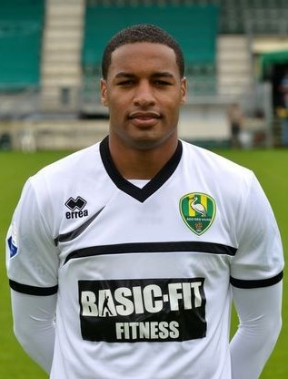 Gino Coutinho